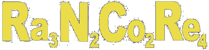 Logo del rapper romano Rancore